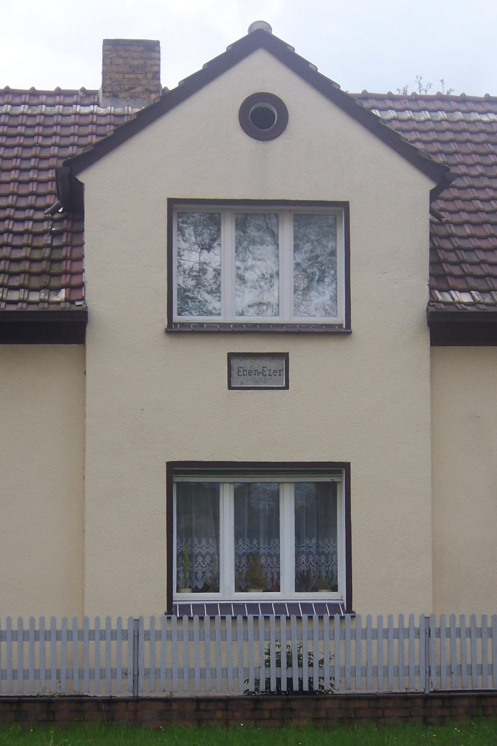 Eingelassene Denkmalplatte mit der Aufschrift „Eben-Ezer“ in Erinnerung an den Großbrand in Schleife (Oberlausitz) von 1889 Map: 51° 32′ 34″ N, 14° 32′ 11″ E